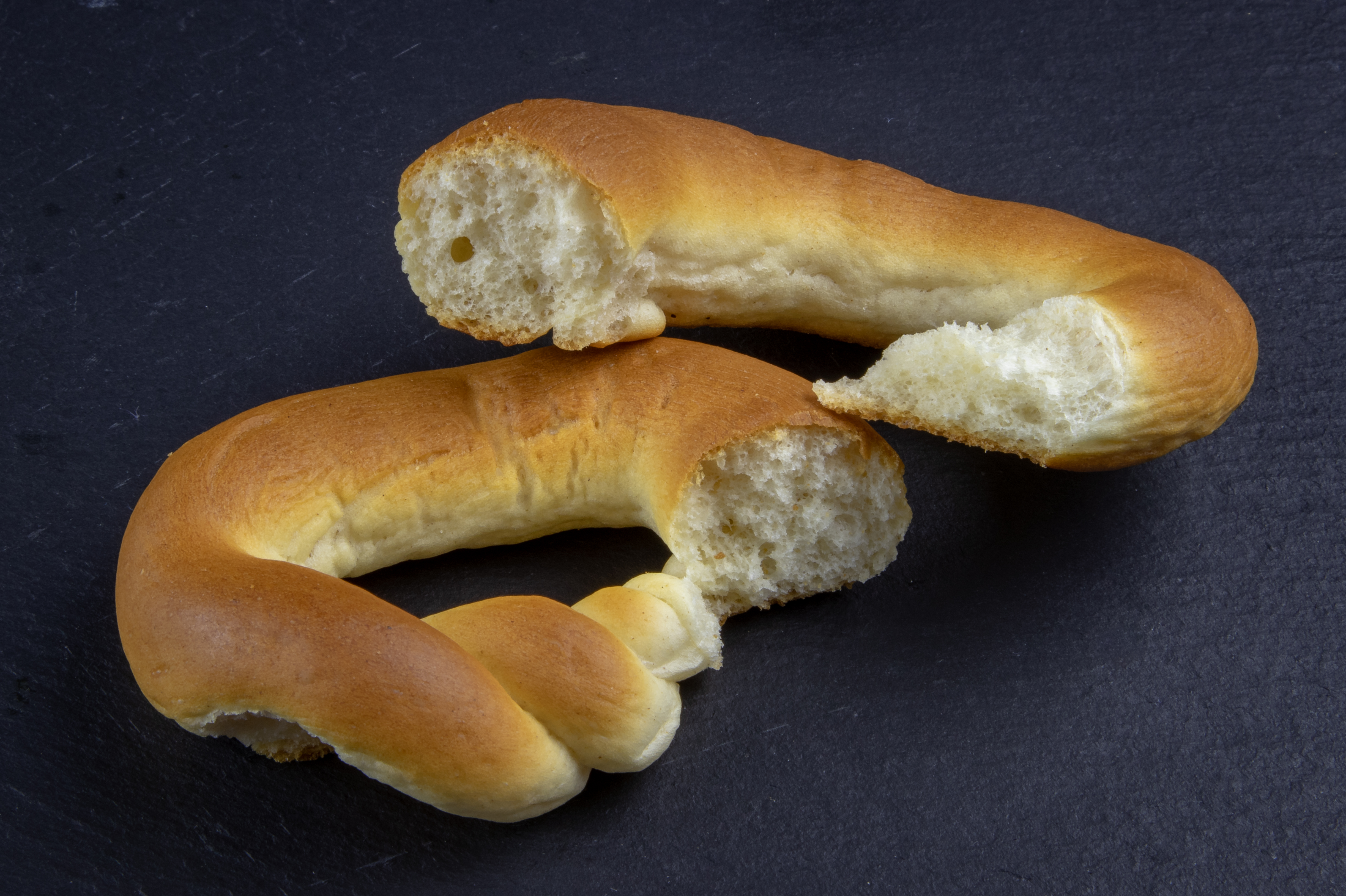 Zerbrochene Burger Brezel vom Hersteller Hösterey, Wuppertal